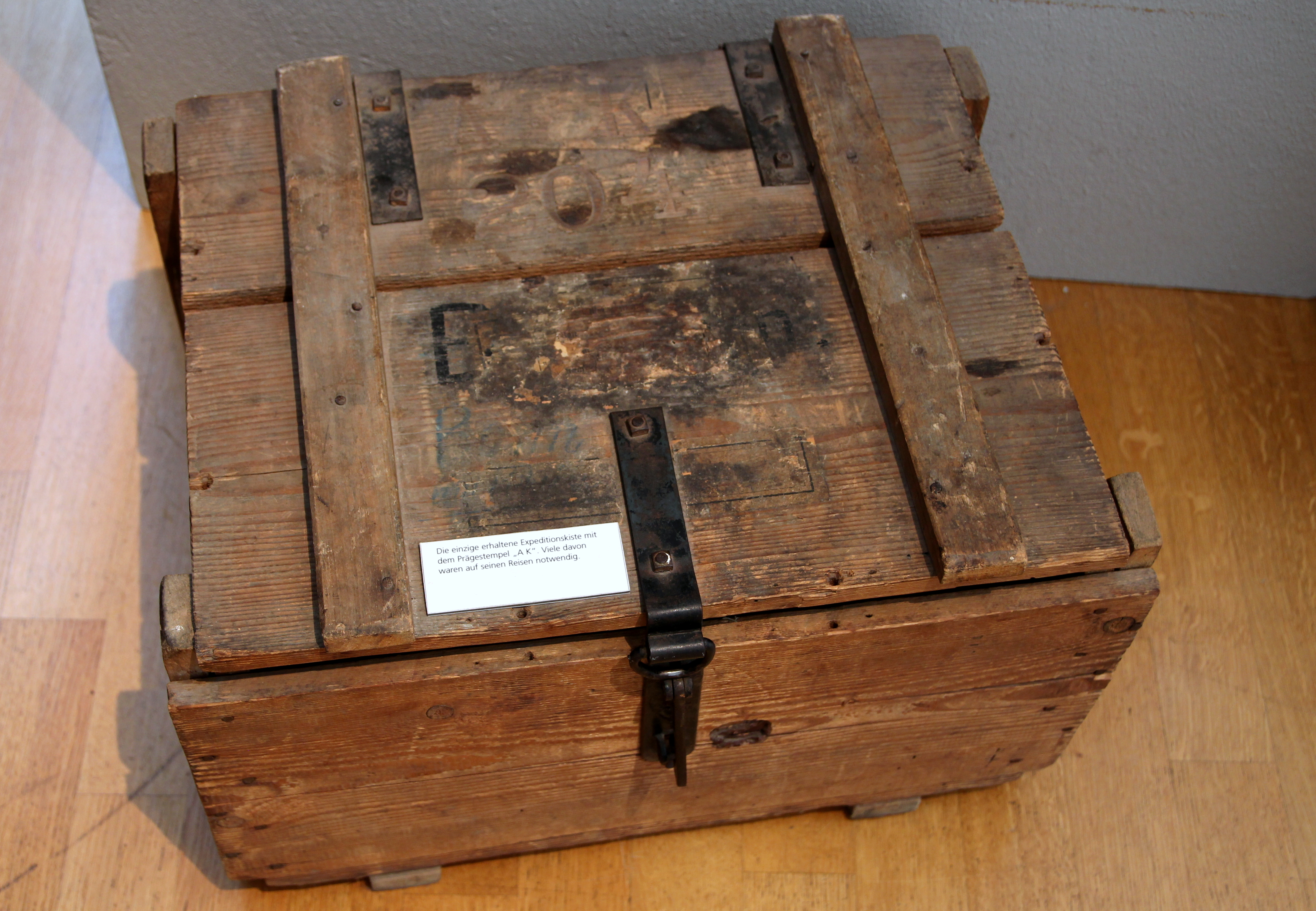 Museum Koenig. Aus der Ausstellung zu Alexander Koenig. Schild: "Die einzige erhaltene Expeditionskiste mit dem Prägestempel 'A K'. Viele davon waren auf seinen Reisen notwendig."